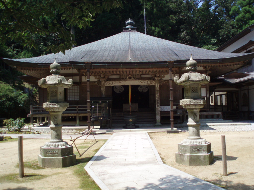 AMIDADERA-temple_sanctuary,_(Nachi-Katsuura,_Wakayama)